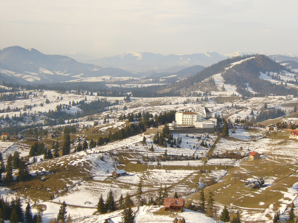 Piatra Fântânele, Tihuta.